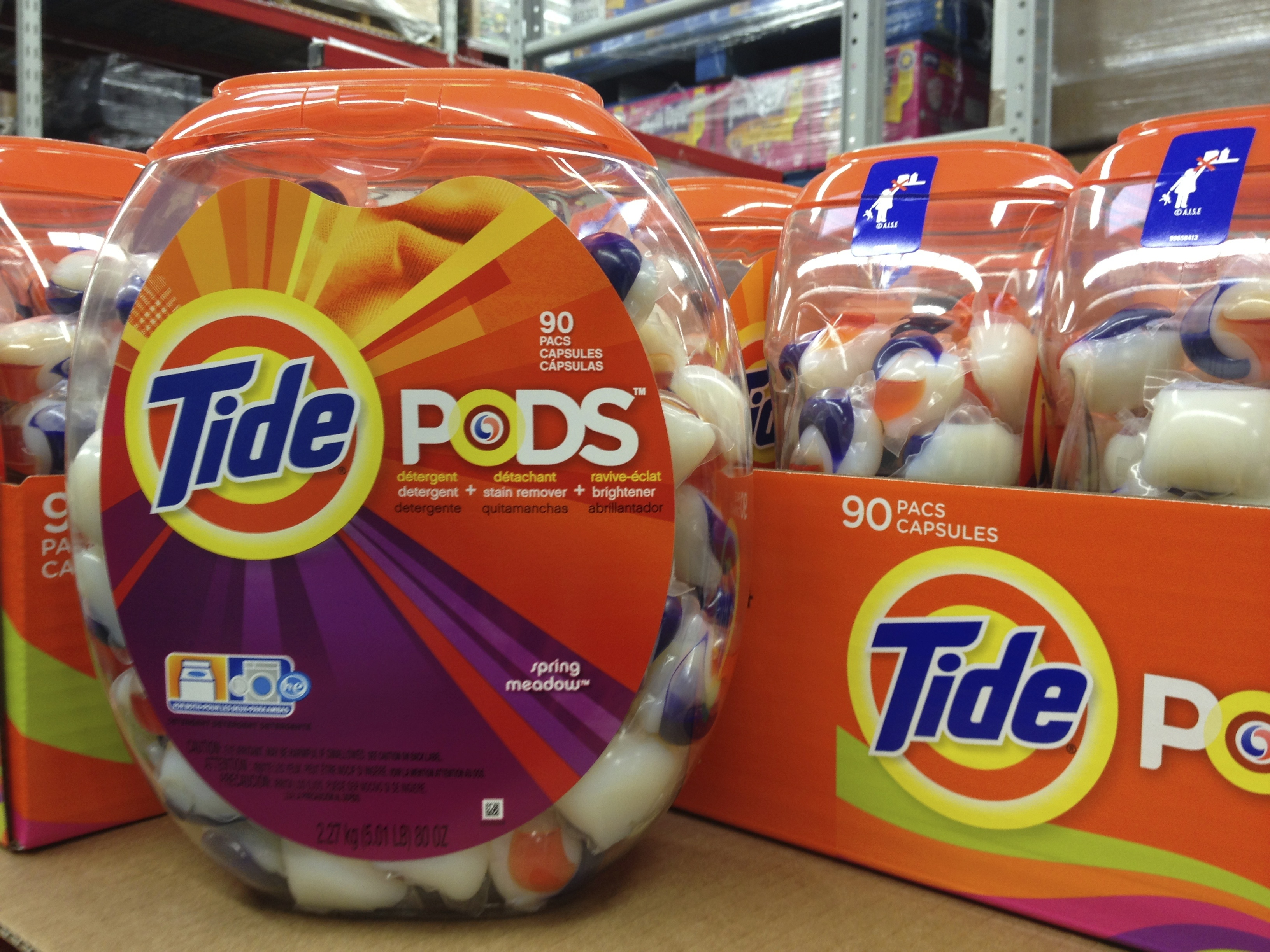 Tide Pods Laundry Detergent Capsules